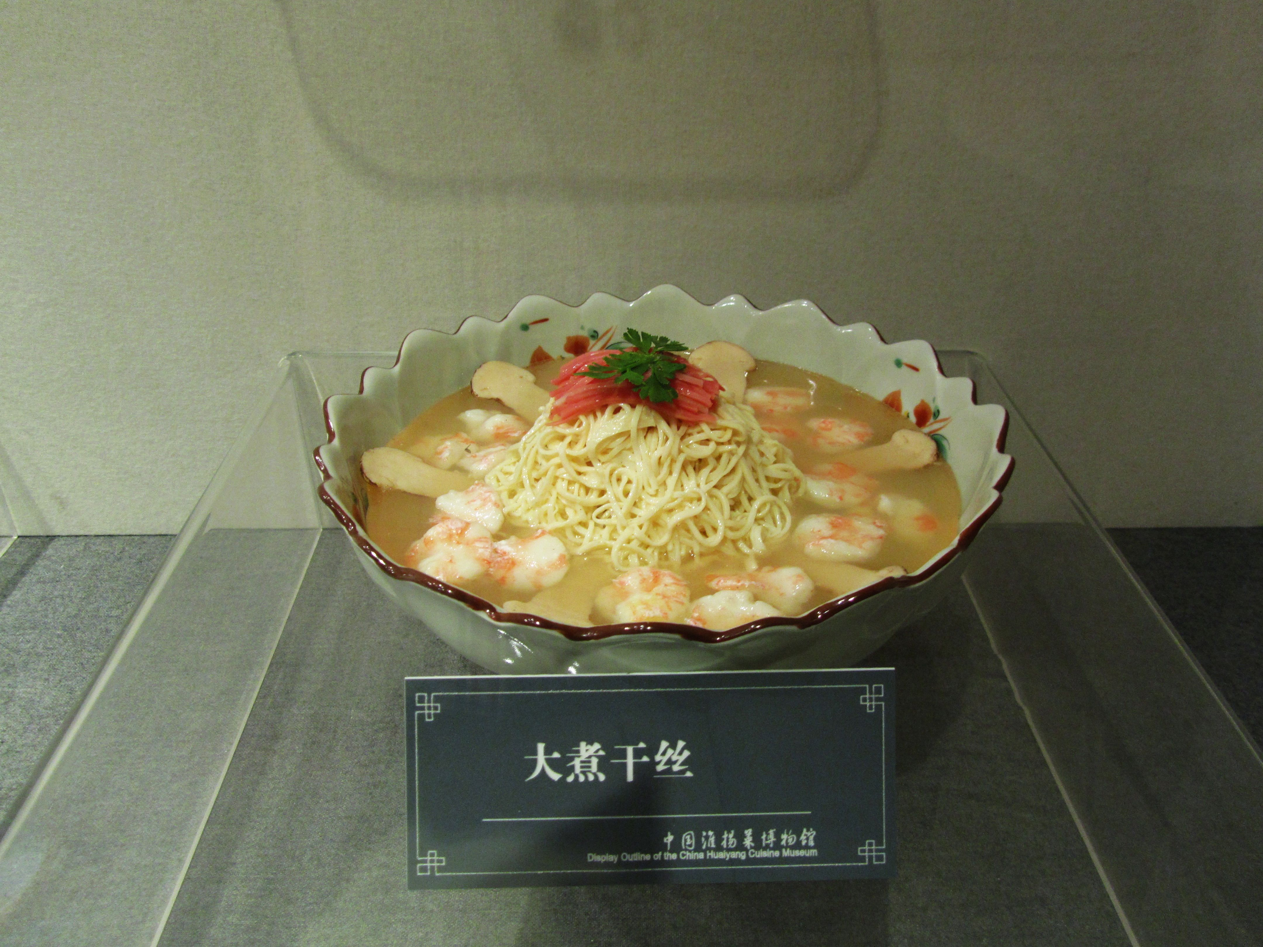 大煮干丝，淮扬菜代表之一，摄于扬州淮扬菜博物馆。